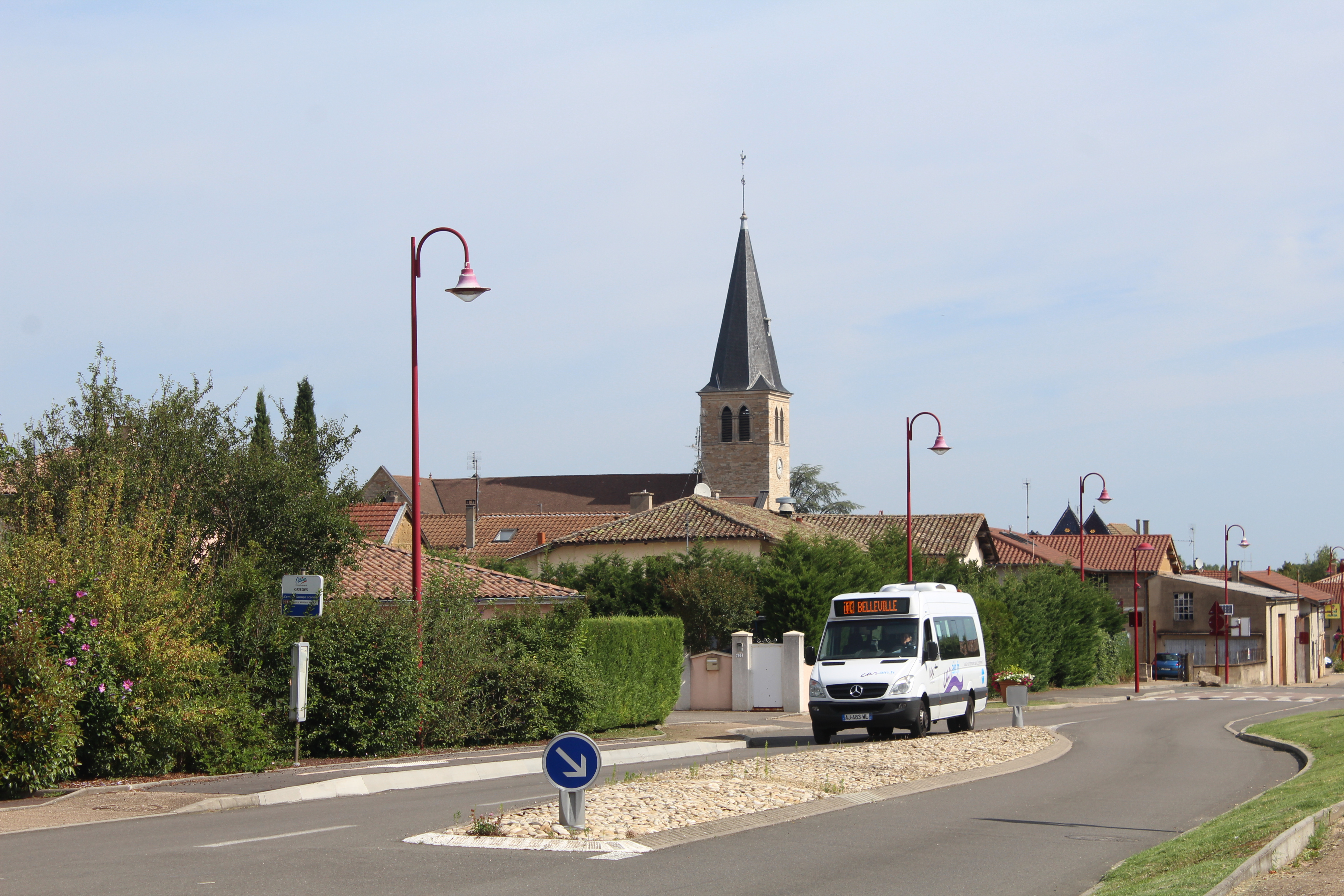 Église de Grièges.